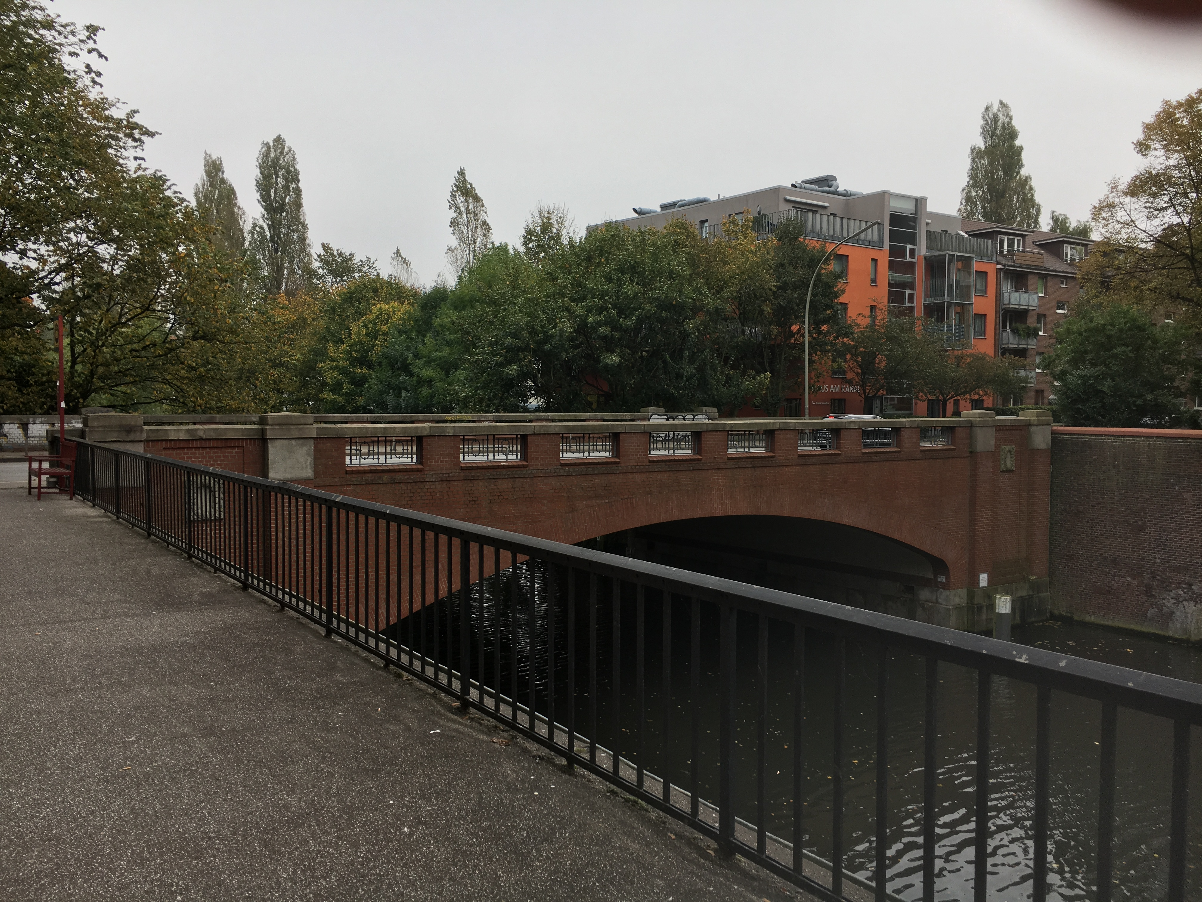 Krausestraßenbrücke, linke Seite zu Barmbek-Nord, unten fließt der Osterbekkanal